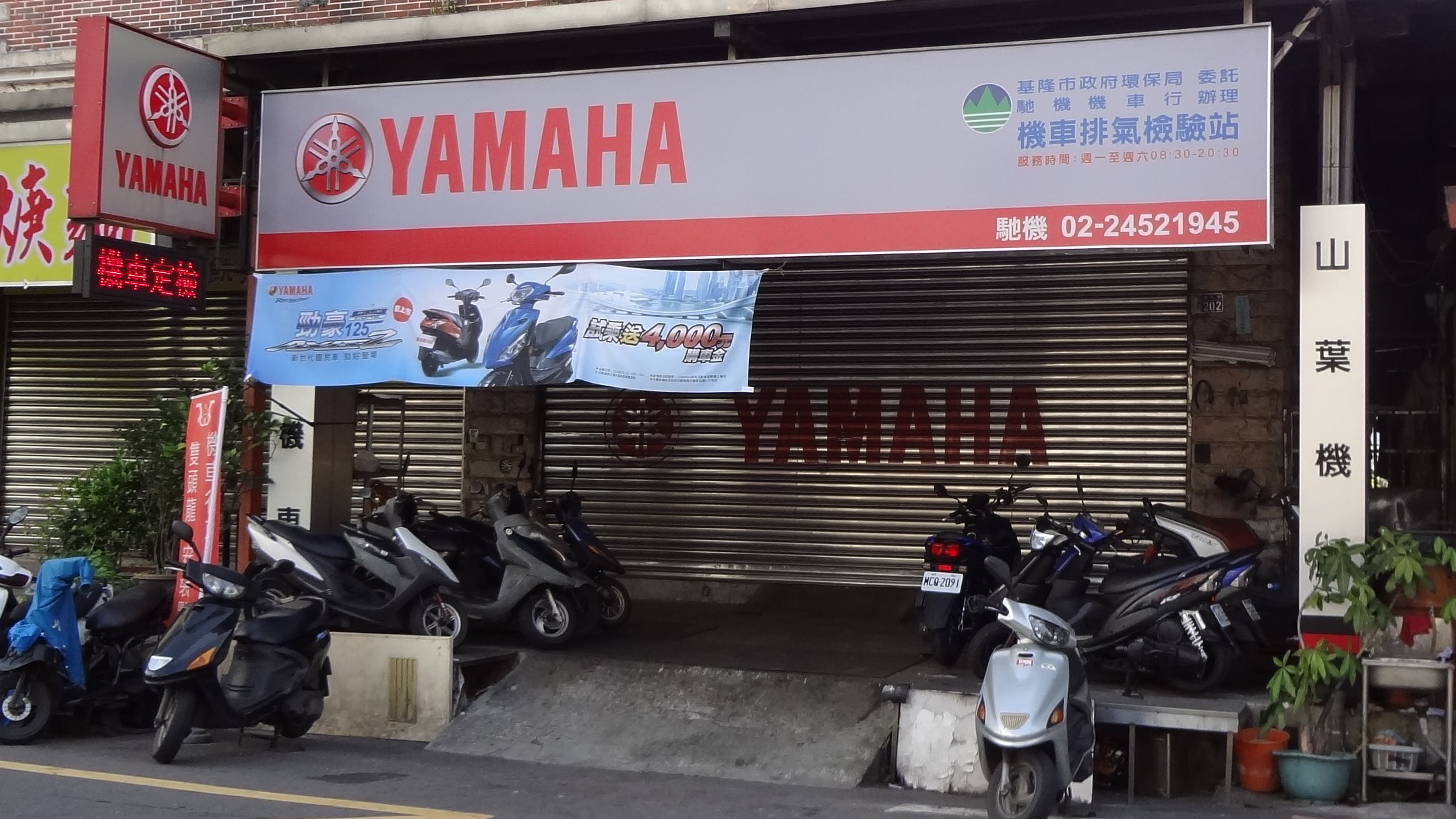 中文（台灣）: 馳機機車行，位於基隆市七堵區福五街202號1樓，是台灣山葉機車經銷商。